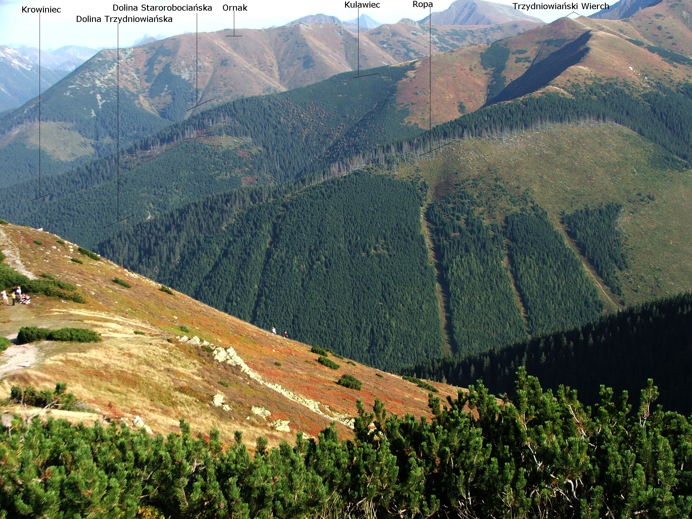 Widok z Grzesia na południowy-zachód